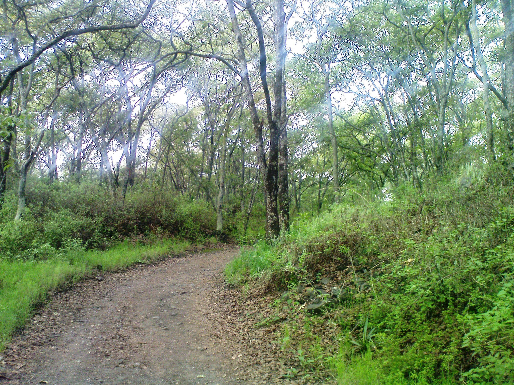 Bosque de Tlalpan.